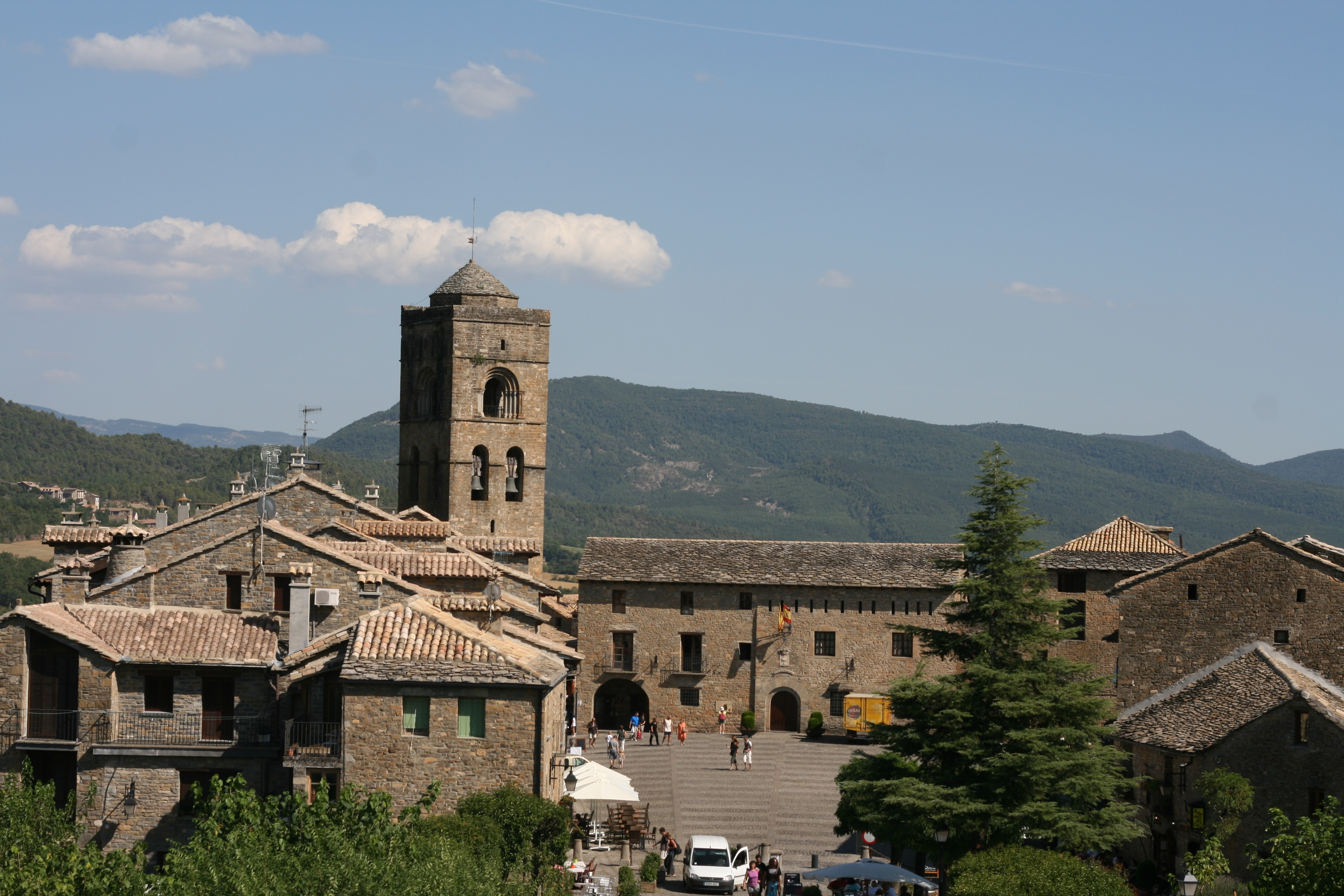 Vue des hauteurs